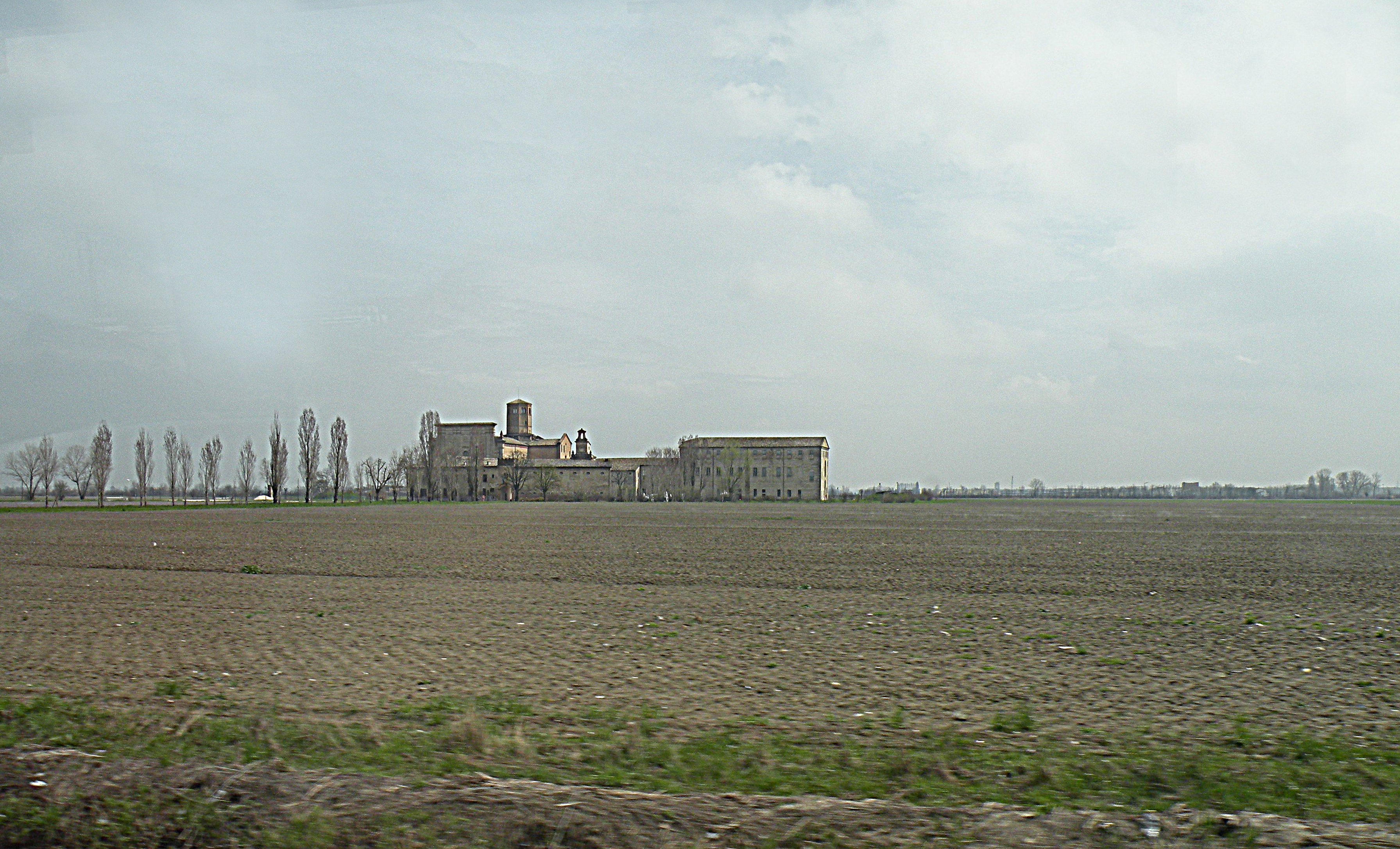 Пейзаж долины реки По